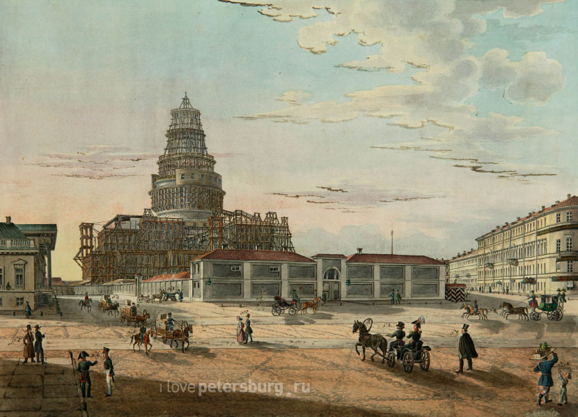 Исаакиевский собор в Санкт-Петербурге в лесах.